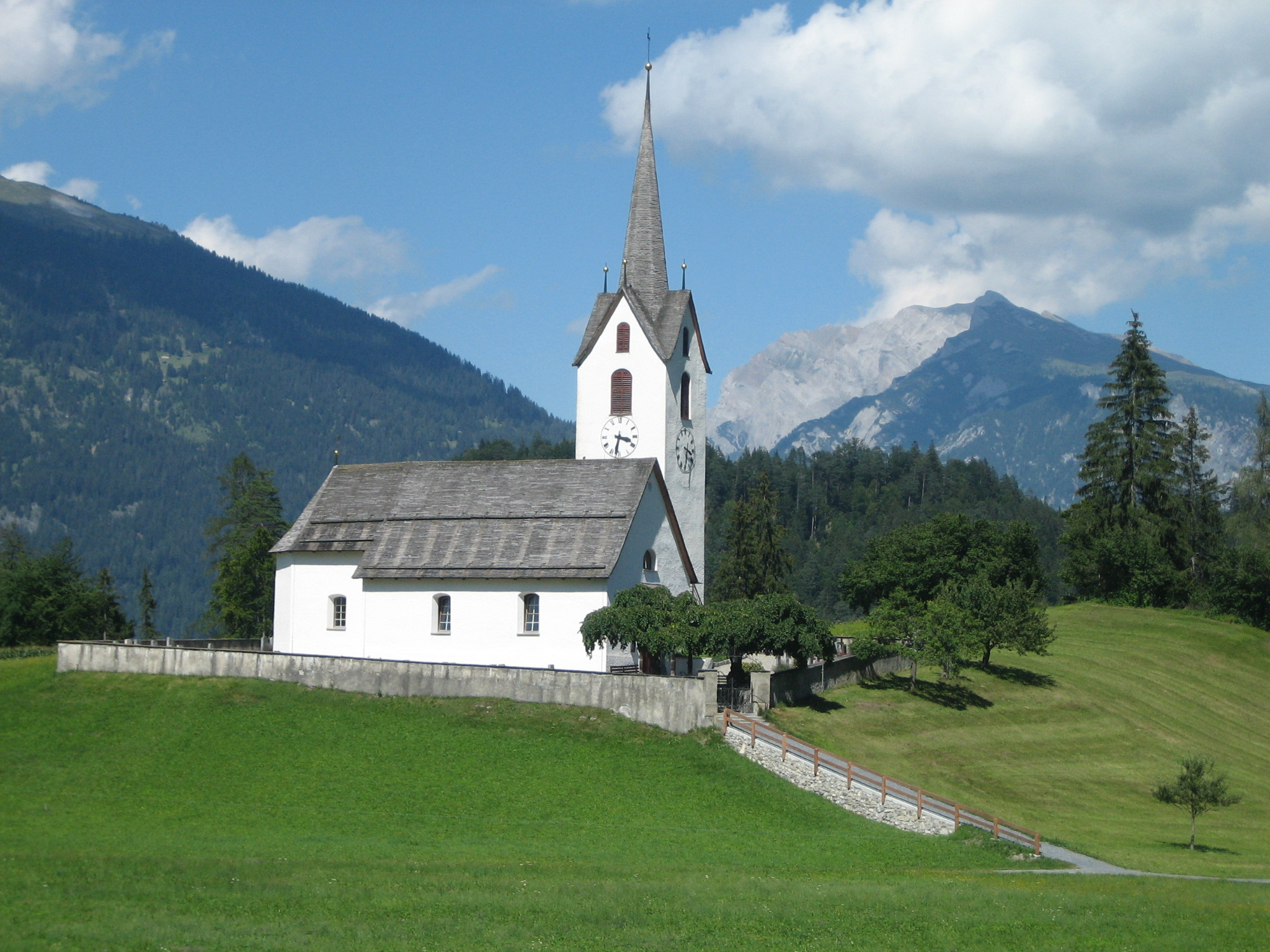 Kirche von Versam